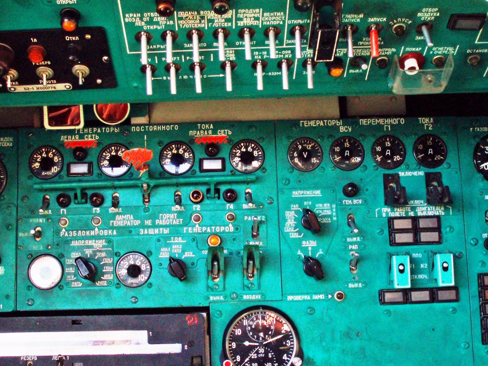 Приборная доска оператора - органы управления и контроля бортовым электроснабжением